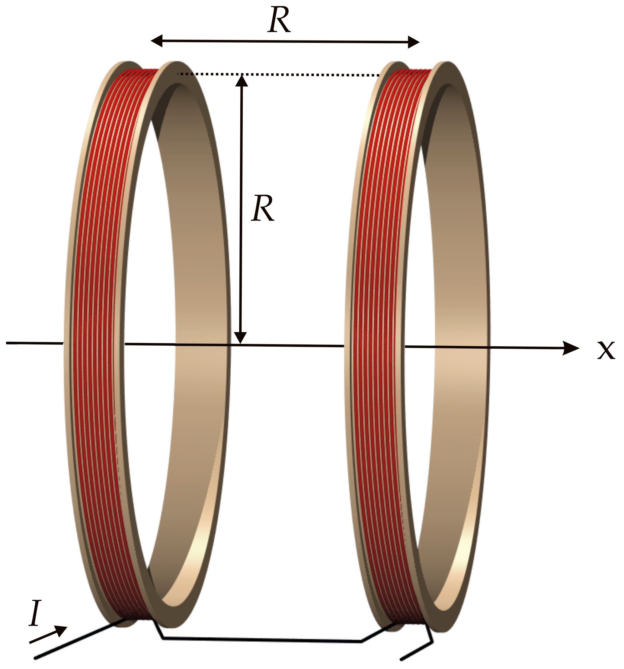 Helmholtz coils